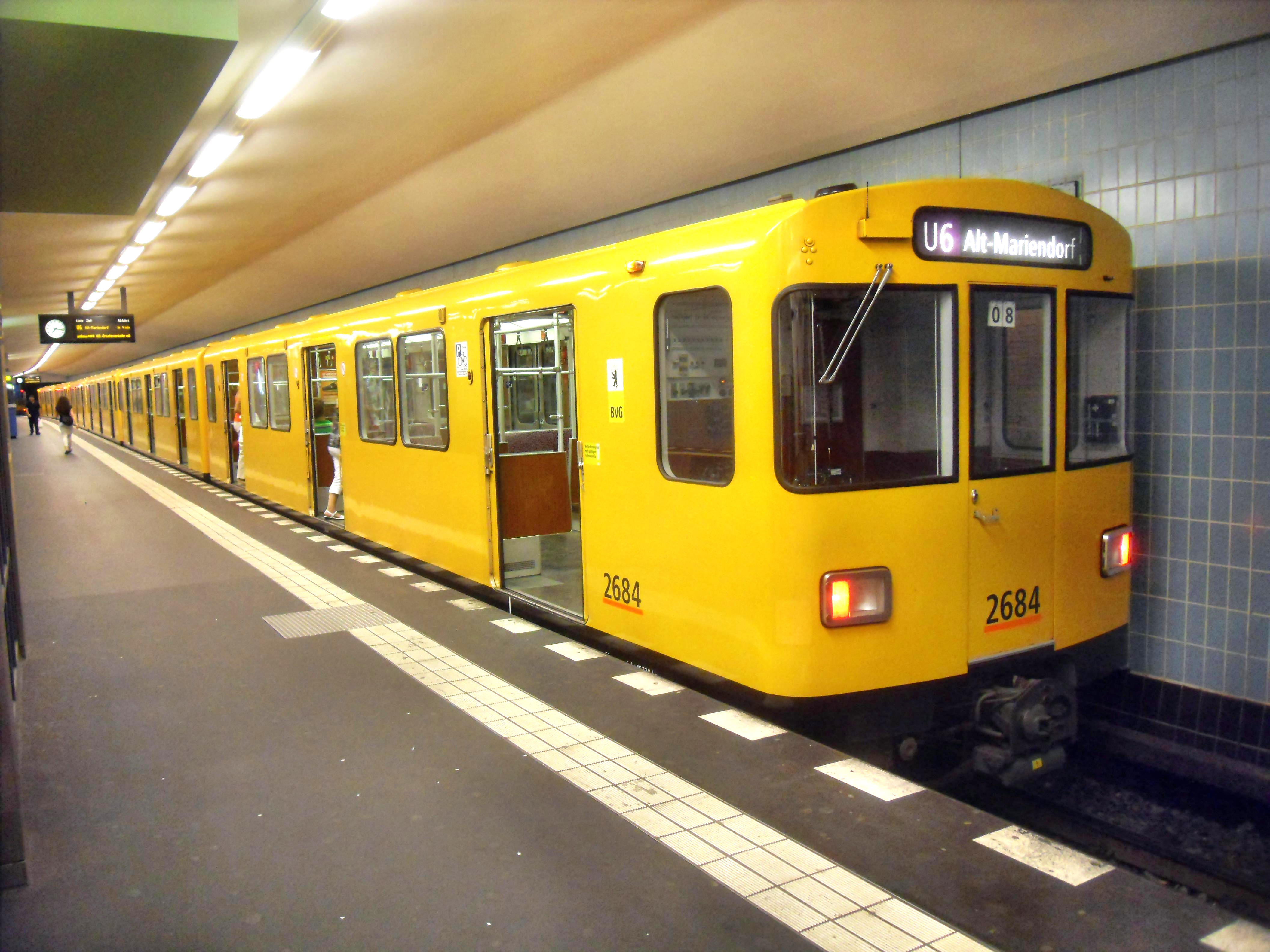 U-Bahn in U-Bahnhof Alt-Tegel in Berlin (Deutschland)